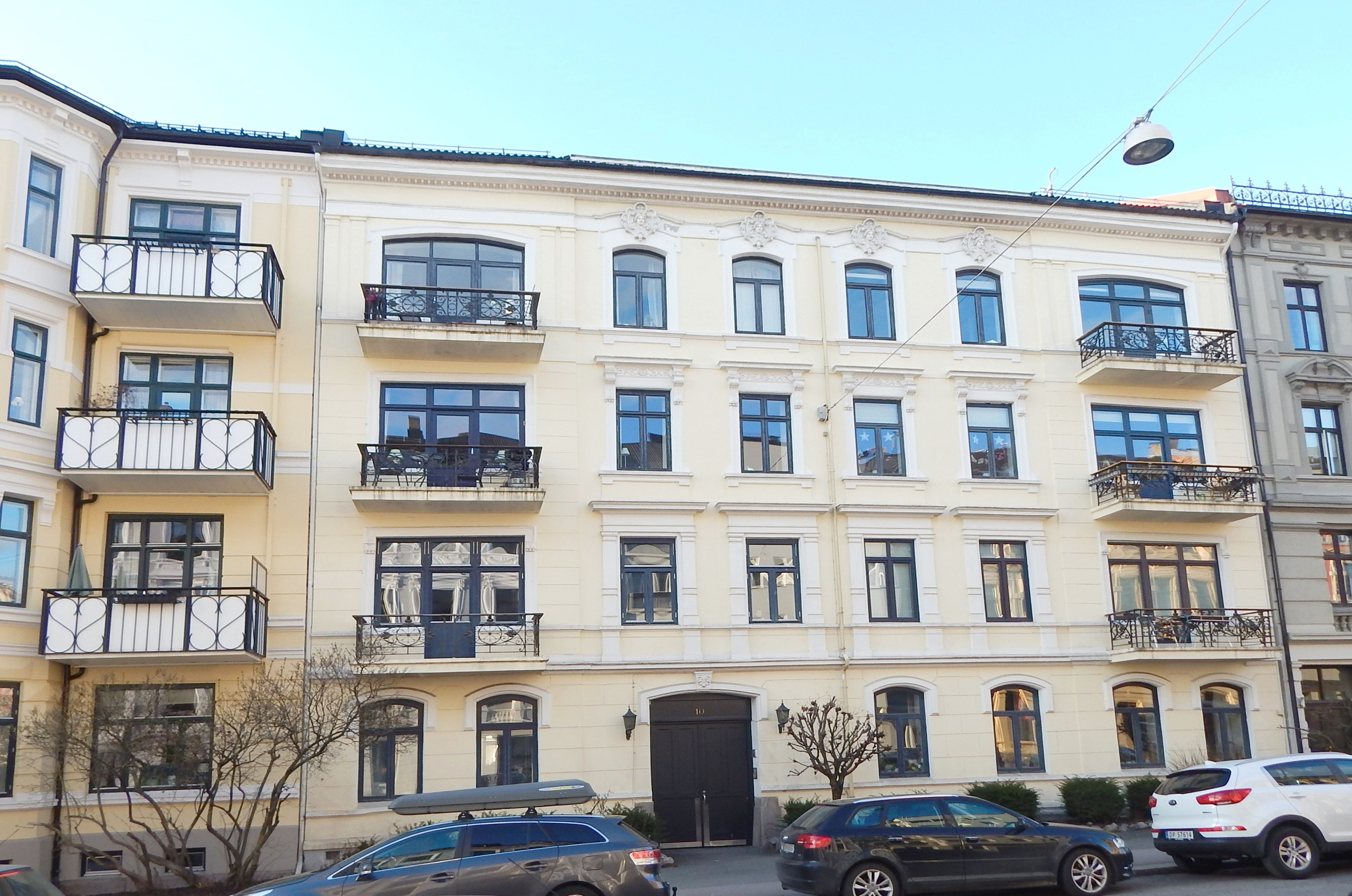 Eckersbergs gate 10